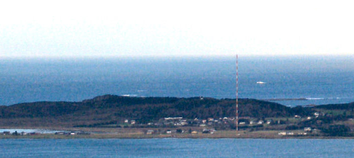 Vigra med Vigra kringkaster